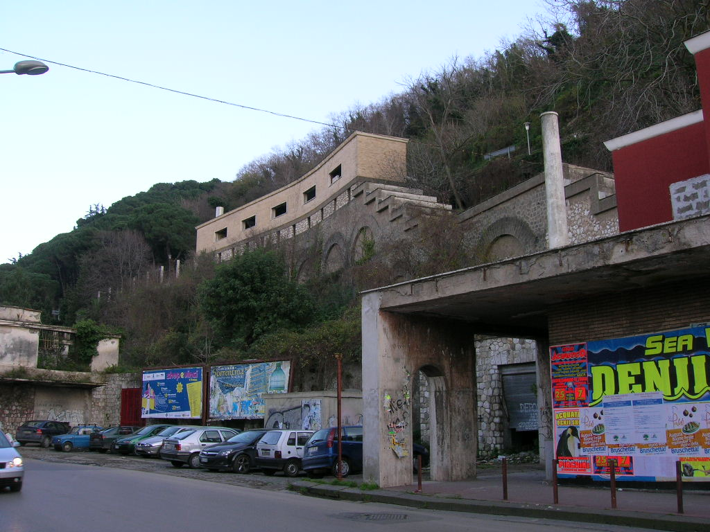 La stazione dismessa di Castellammare Terme della Circumvesuviana